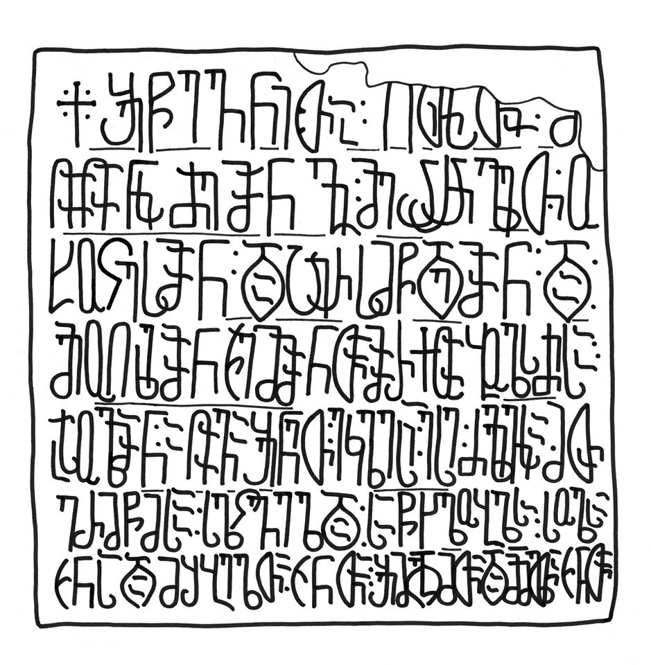 სურამის ციხის წმინდა გიორგის ეკლესიის წარწერის პალეოგრაფიული პირი, აღებულია სტატიიდან